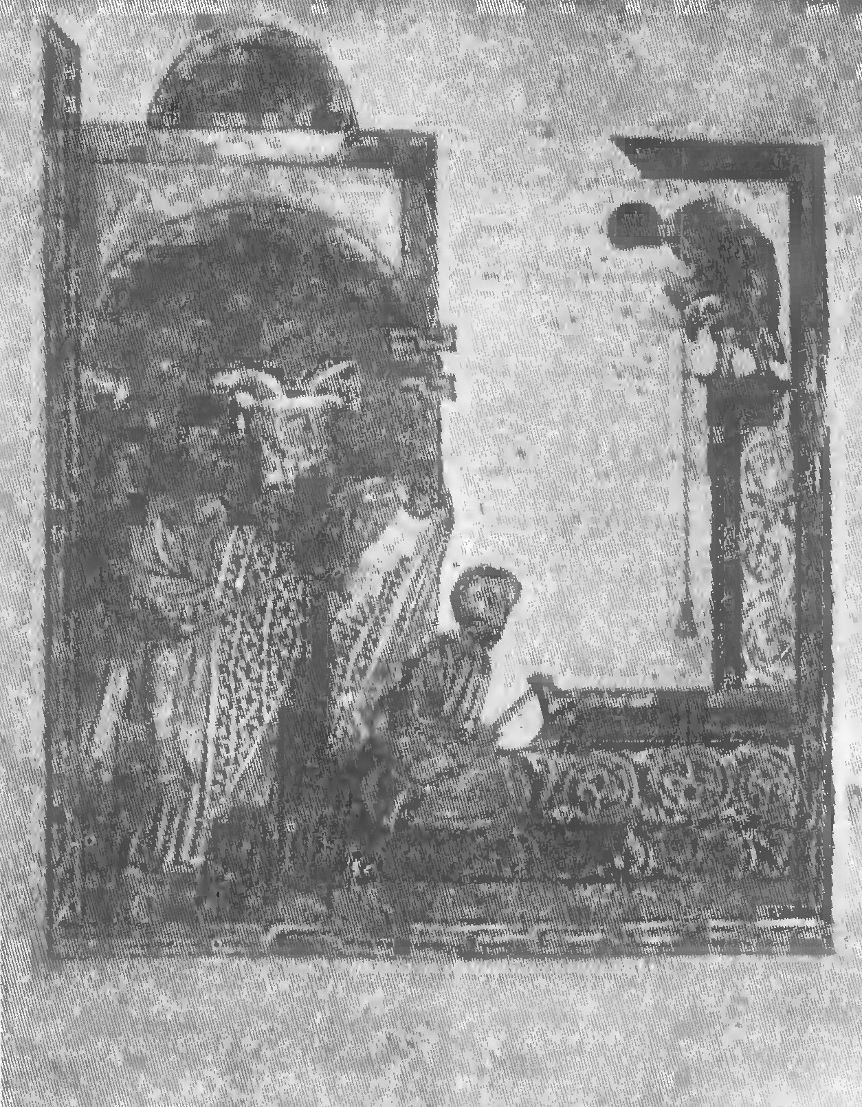 Եկեղեցու հիմնարկեք